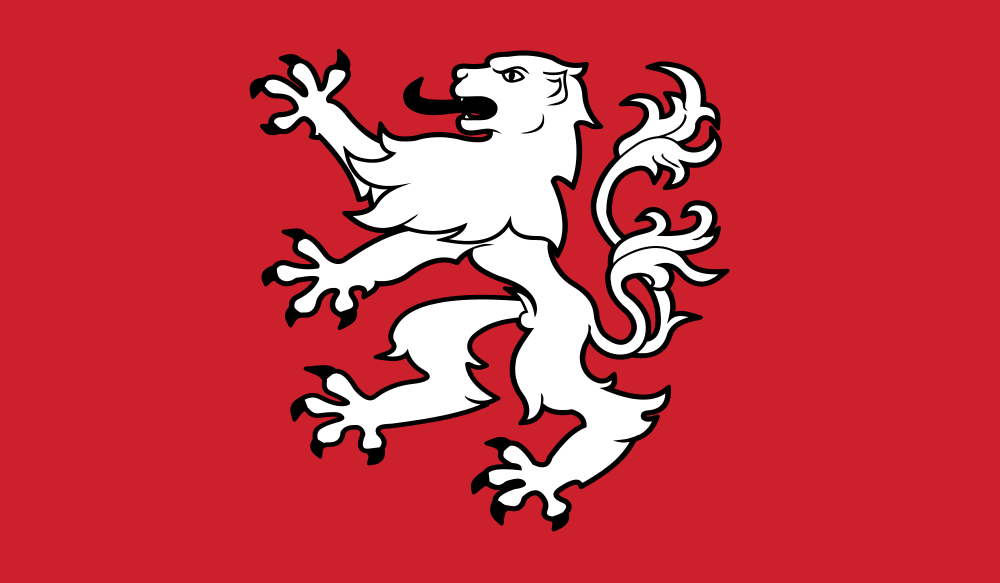 Drapeau traditionnel du Pays d'Yveline (aux Portes de la Normandie, rattaché à l'Ile-de-France), repris de l'ancienne bannière des comtes de Montfort-l'Amaury